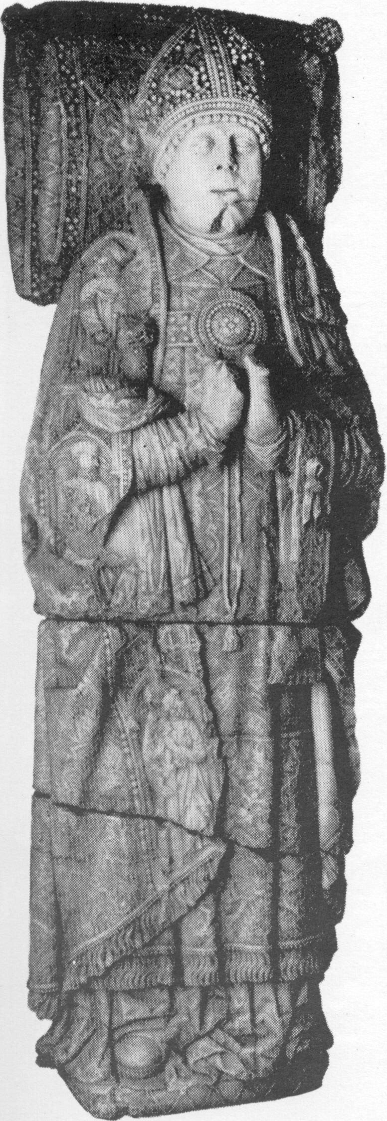 Escultura procedente de su mausoleo, esculpido por Vasco de la Zarza en el siglo XVI para el monasterio de San Francisco (Cuéllar, Segovia).